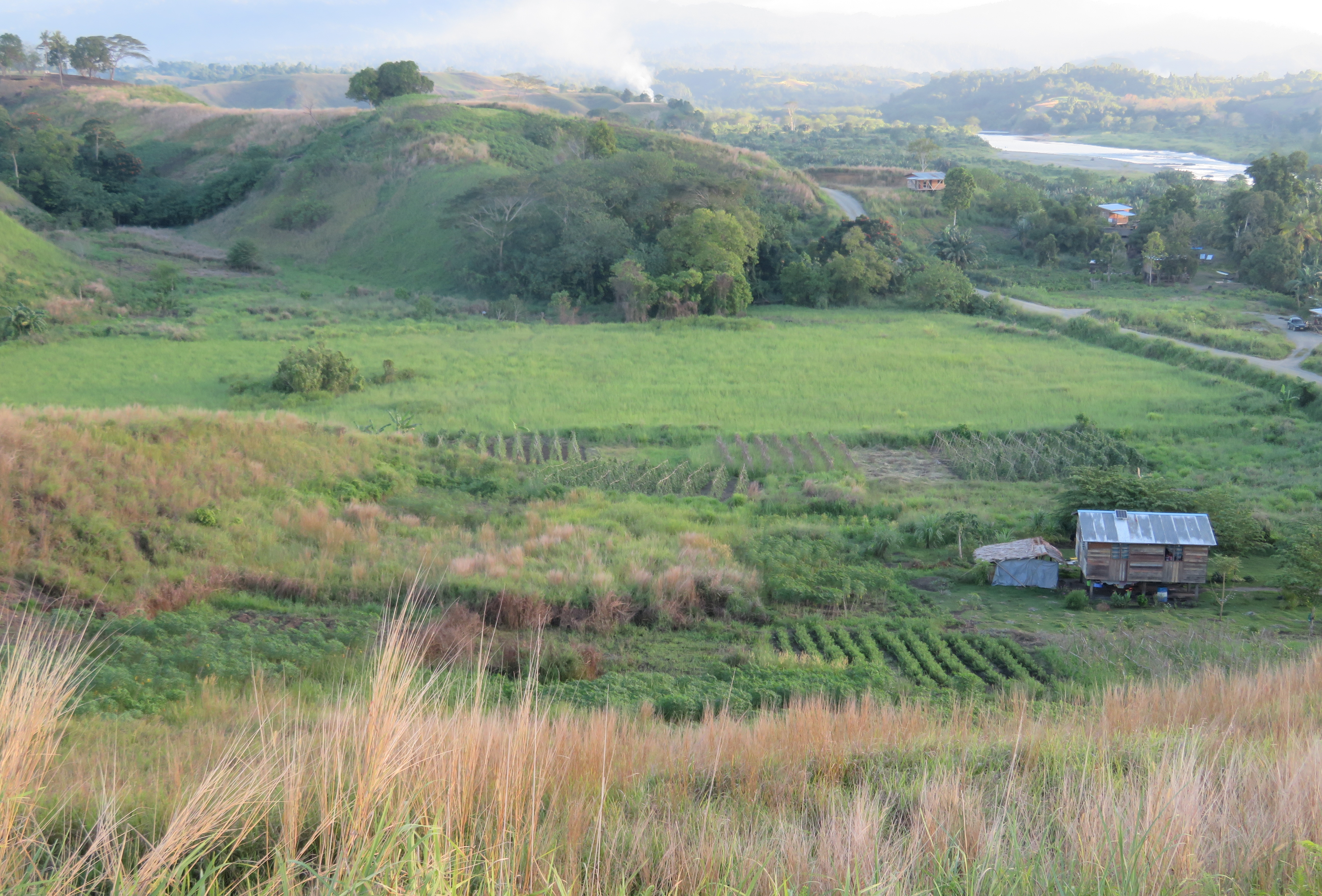 Ackerbau zur Selbstversorgung auf Guadalcanal, Salomonen